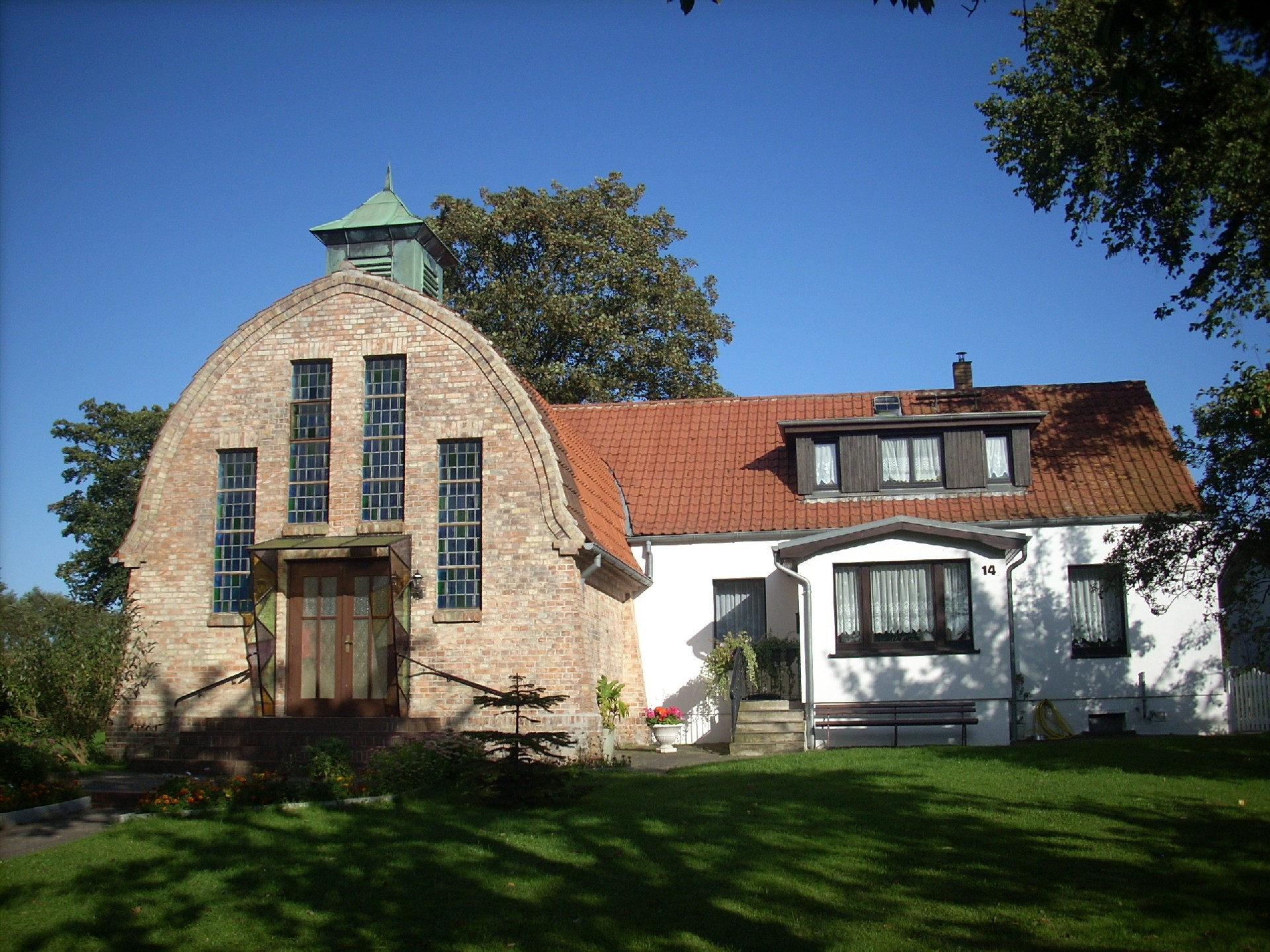 Klütz, Mariä Himmelfahrt Catholic Church